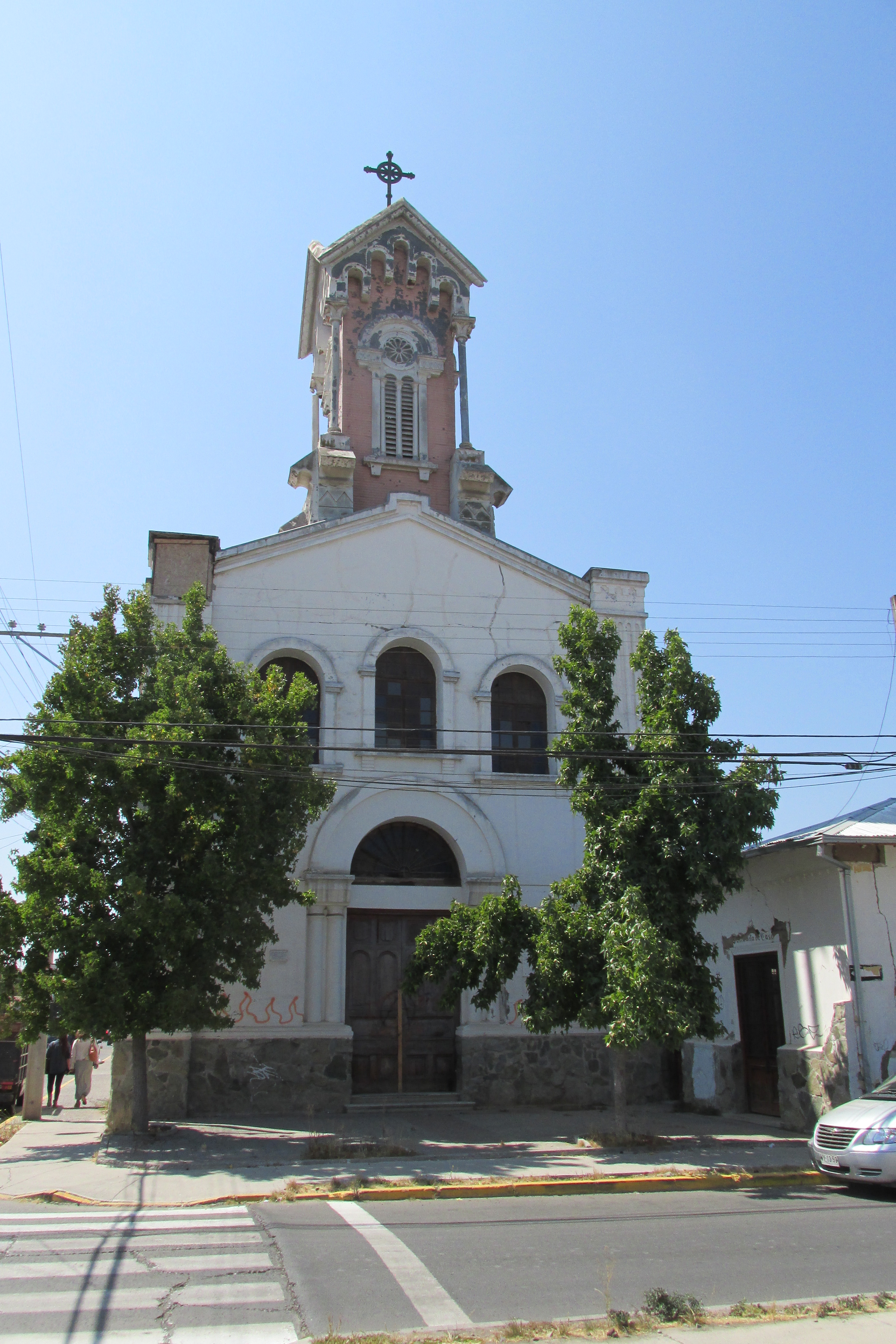 Monumento Histórico declarado por CNM de Chile, ubicado en calle San Agustín esquina SE Fuenzalida comuna Melipilla Región Metropolitana Chile